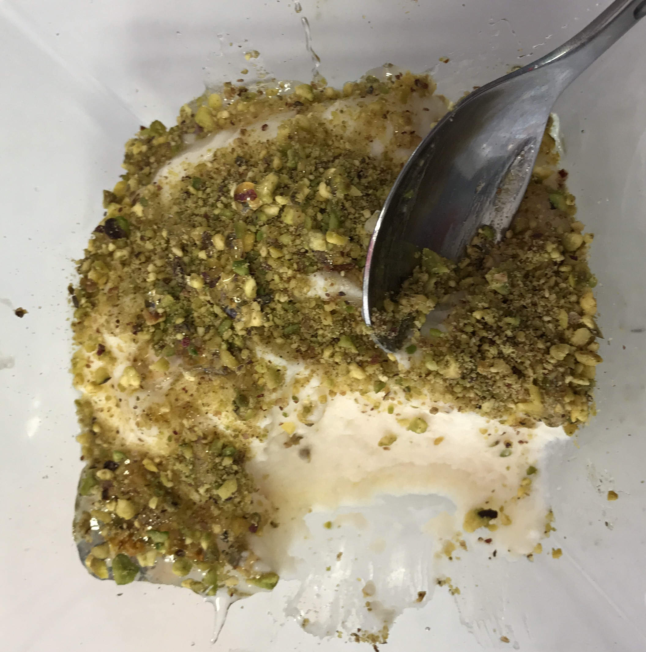 Layali Laban (yaourt libanais) dégusté au "Comptoir de Beyrouth" au 284 Cours Lafayette, 69003 Lyon.